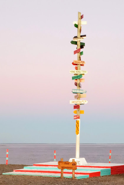 Mirador Poste Kilométrico, ubicado en Punta Verde, San Antonio Oeste, RN. Desde este sitio podemos observar el Puerto del Este, y la Empresa ALPAT.